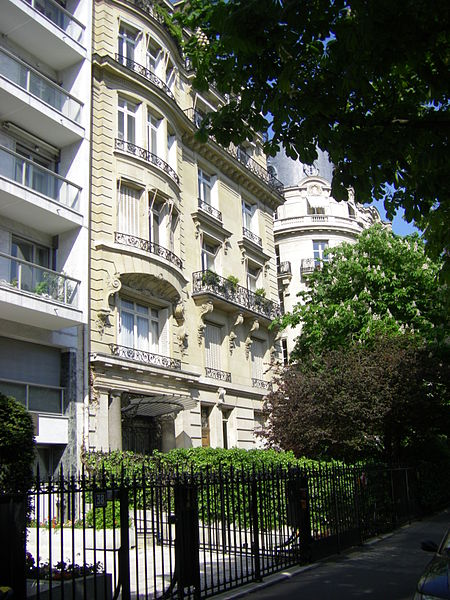 Haus 36 in der Avenue Georges Mandel in Paris, worin Maria Callas starb